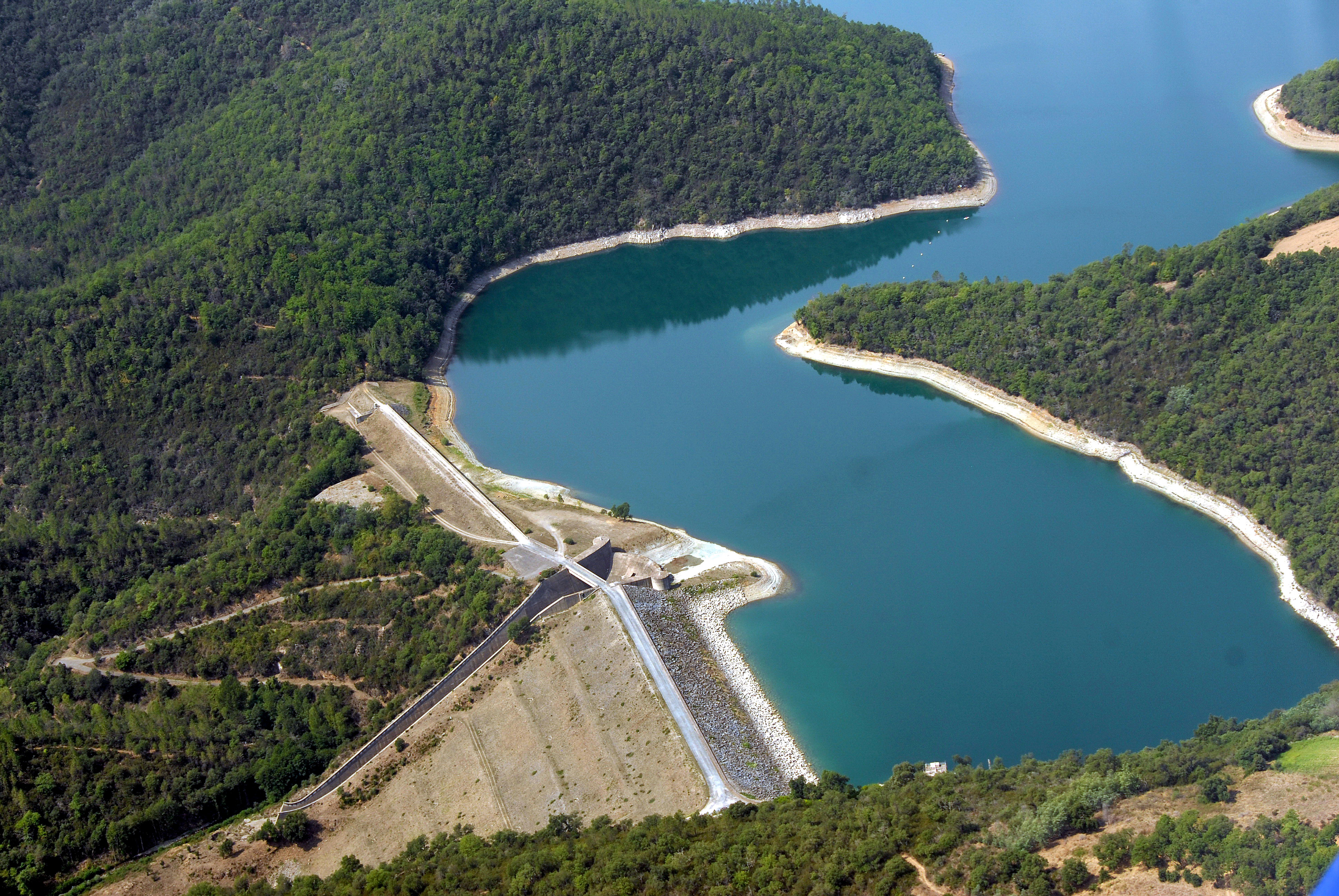 Barrage hydro electrique de Tanneron